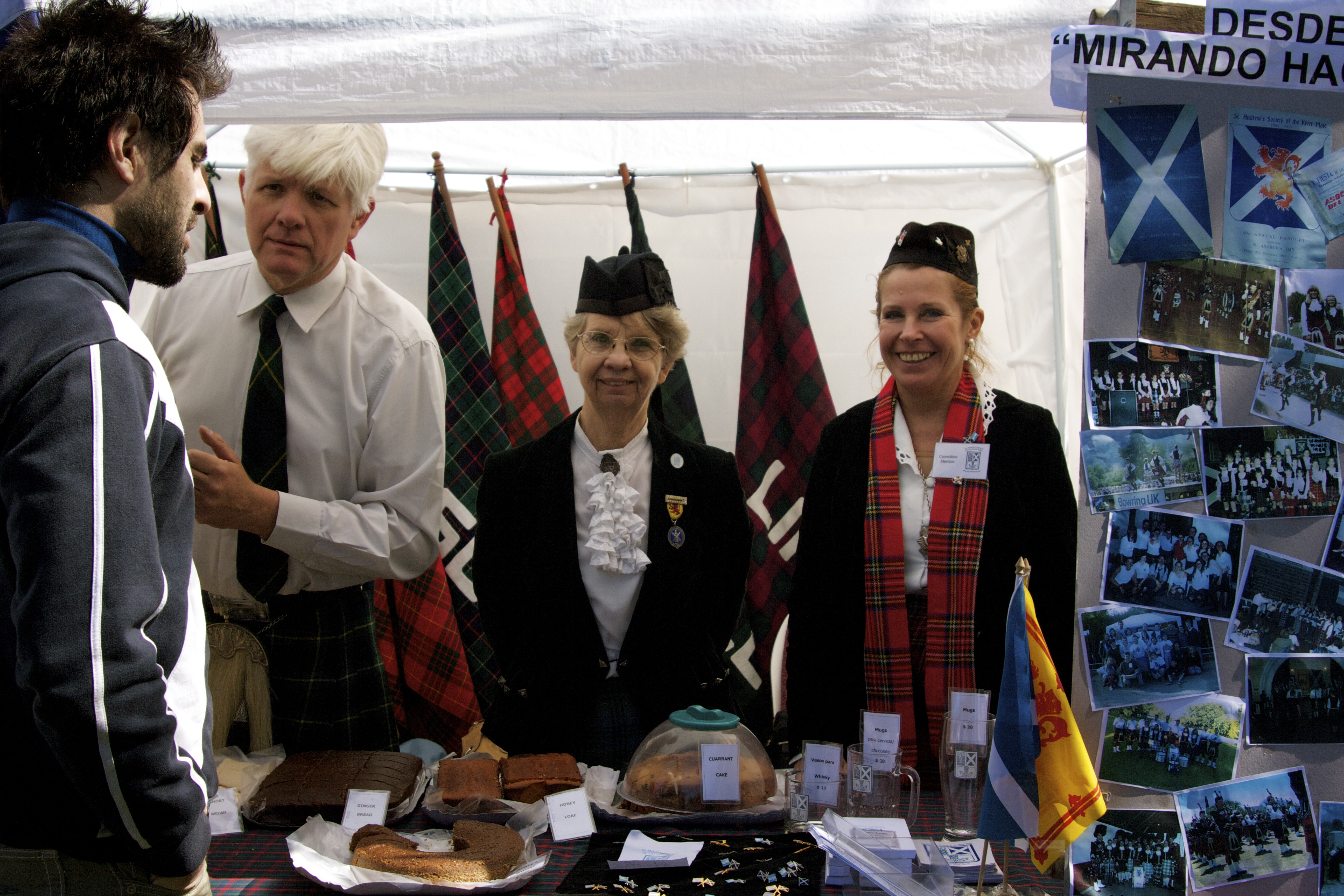 Dia del Inmigrante 2010 24